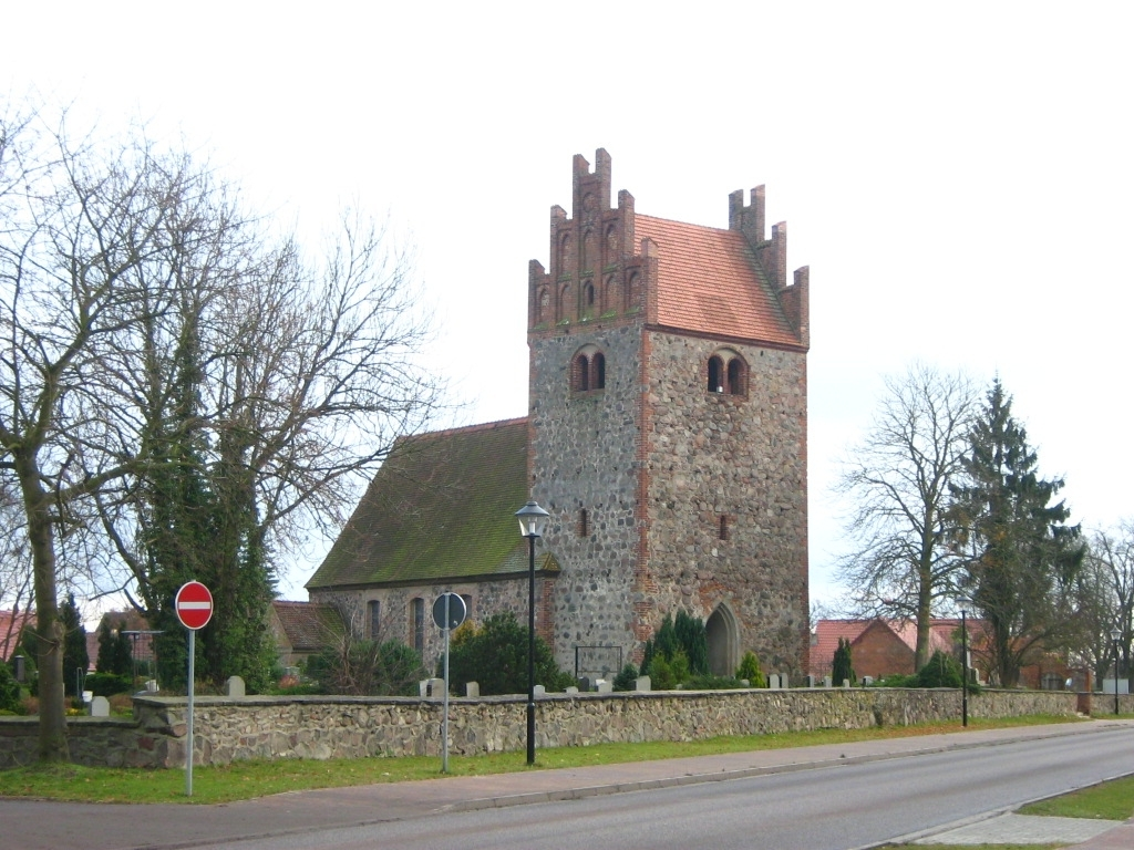 Kirche aus dem 13.Jh. in Herzberg (Mark) im brandenburgischen Landkreis Ostprignitz-Ruppin